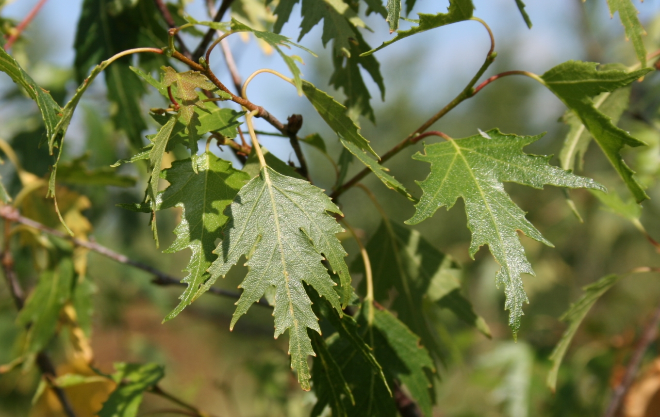 Betula pendula 'Dalecarlica': Foliage